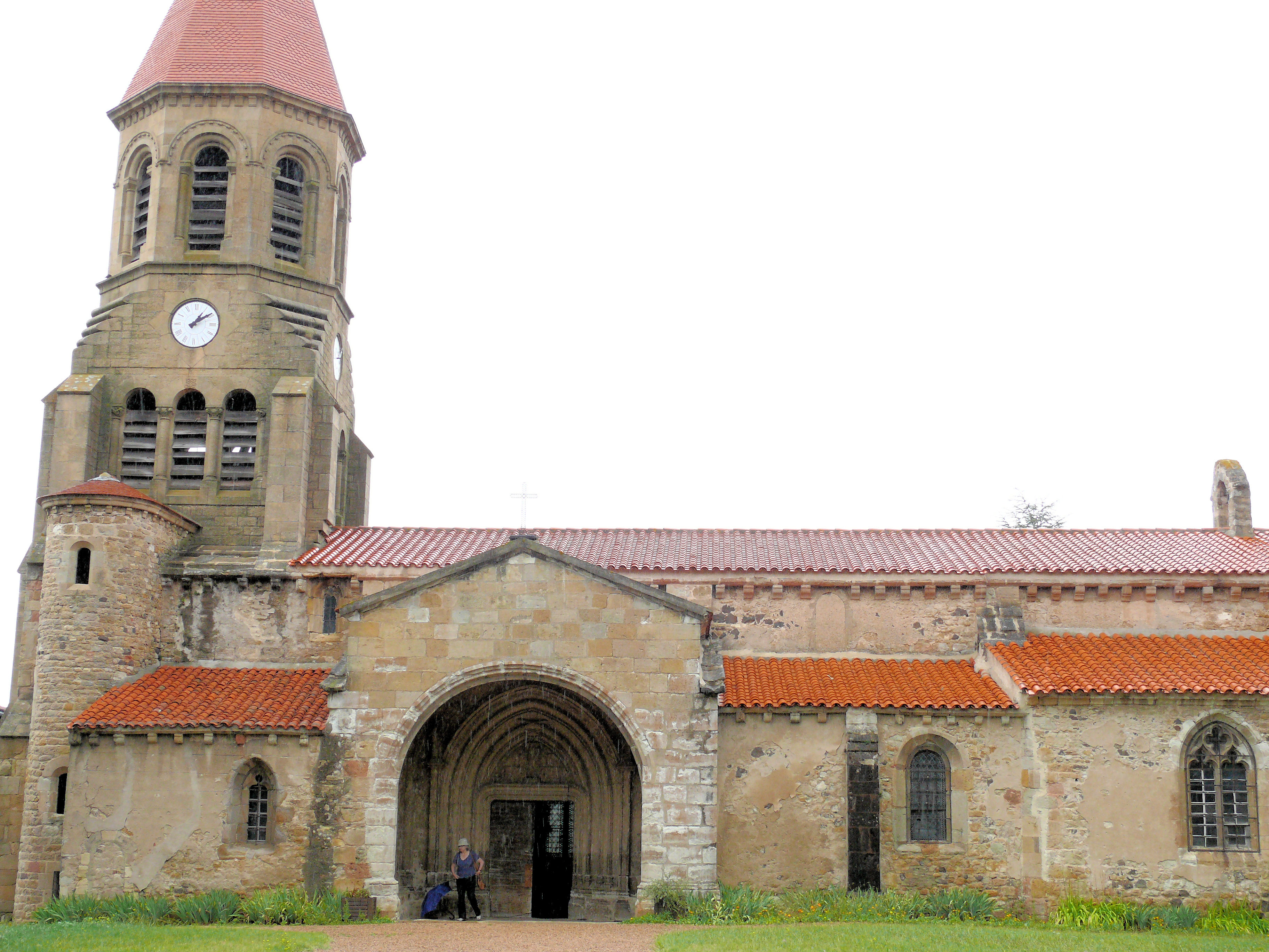 Nonette - Eglise Saint-Nicolas